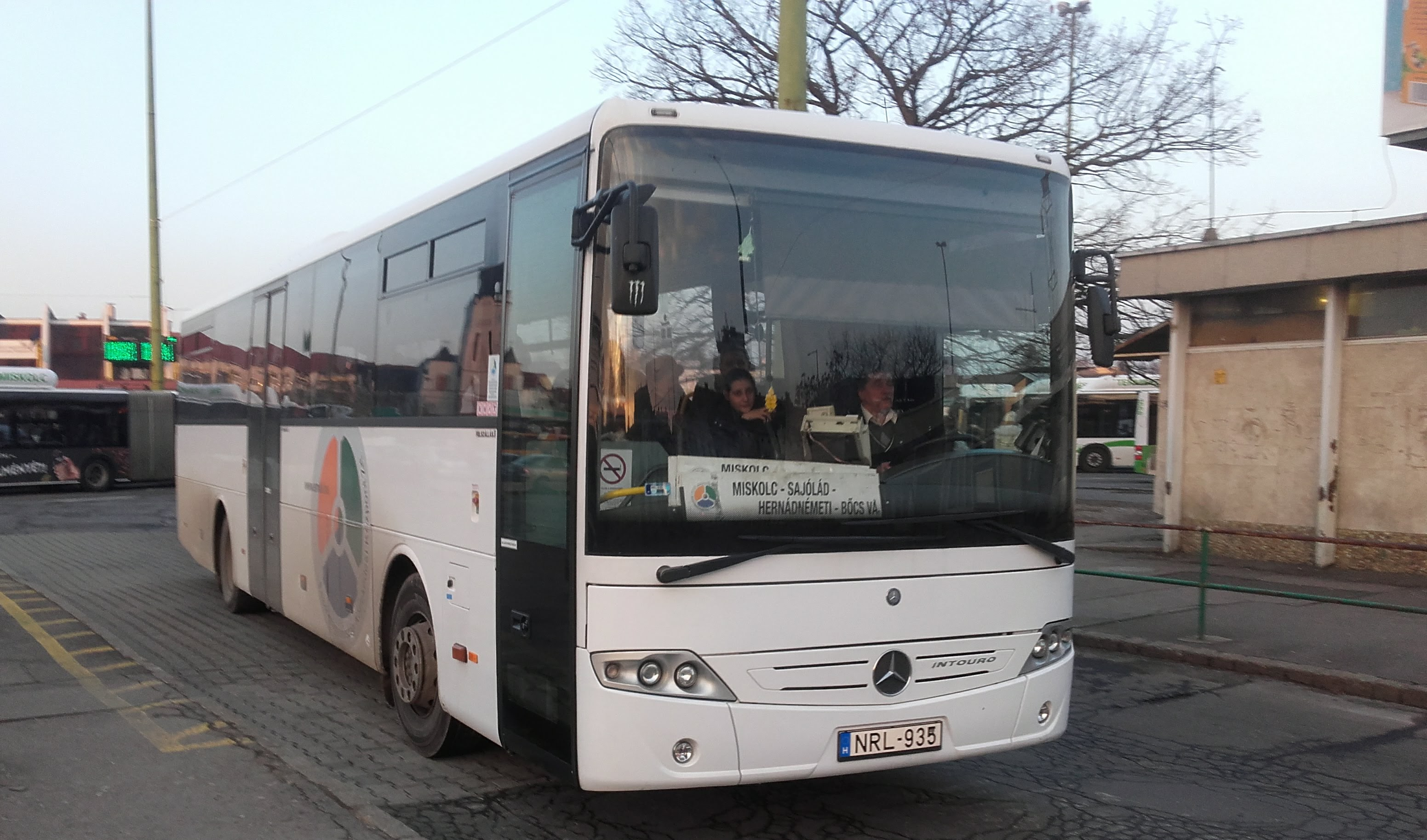 Az ÉMKK NRL-935 rendszámú Mercedes Intouro busza Miskolcon, a 3733-as helyközi járaton.